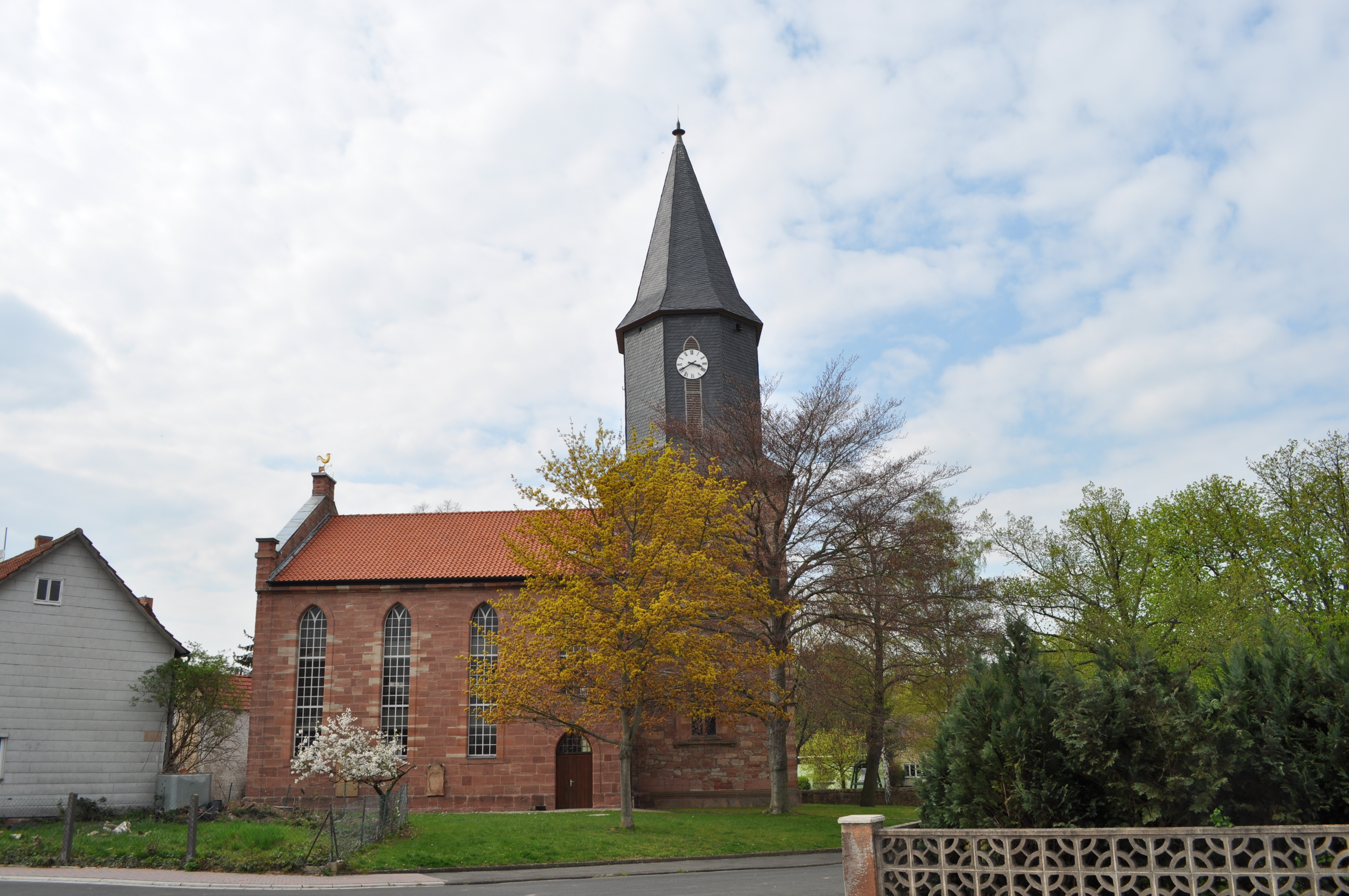 evangelisch-reformierte Kirche in Obersuhl